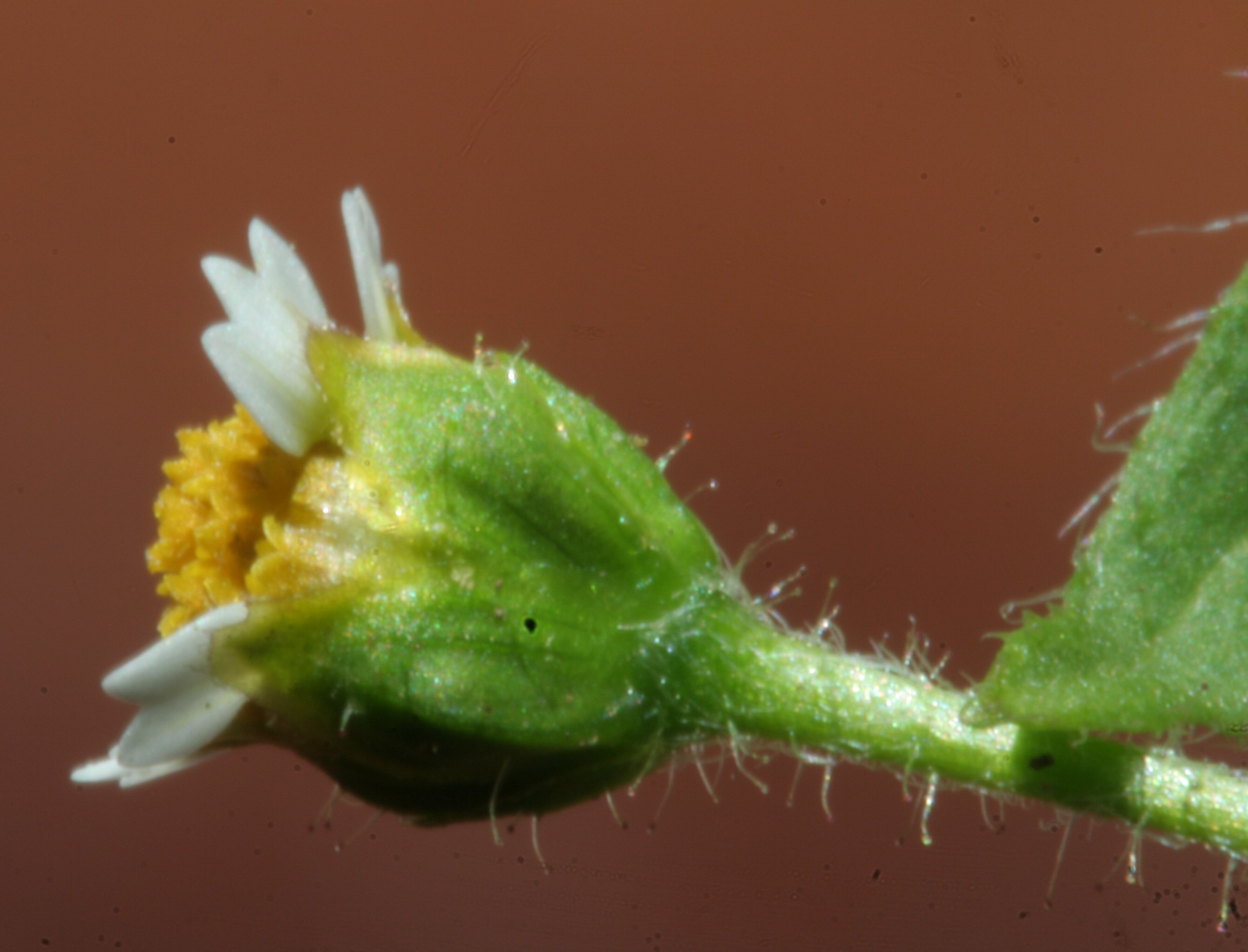 Galinsoga ispida - località: Villa Prima, Limana (BL), 350 m s.l.m.